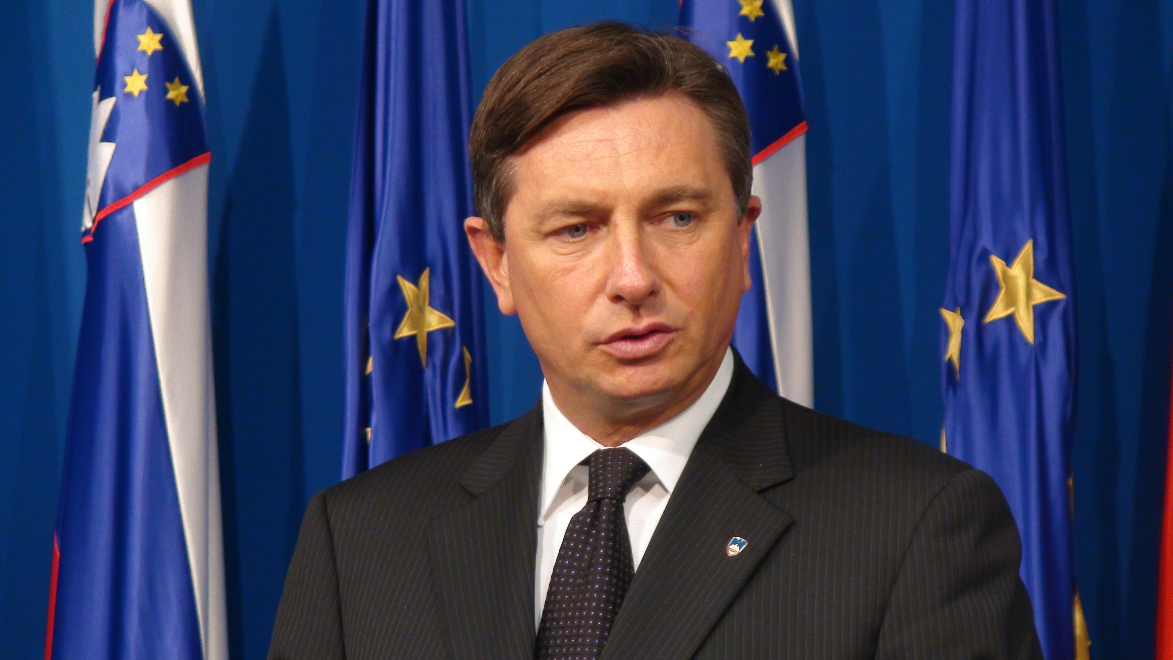 Na novinarski konferenci so nastopili predsednik vlade Borut Pahor, ministrica za gospodarstvo Darja Radić, minister za finance Franc Križanič in minister za zdravje Dorijan Marušič.